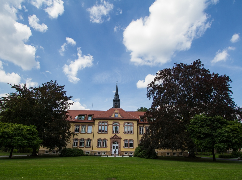 Chemnitz_Altendorf, Flemmingstraße,_Rehabilitationszentrum_für_Blinde (vormals Blindenanstalt): Haus 2 (dahinter die Kirche)